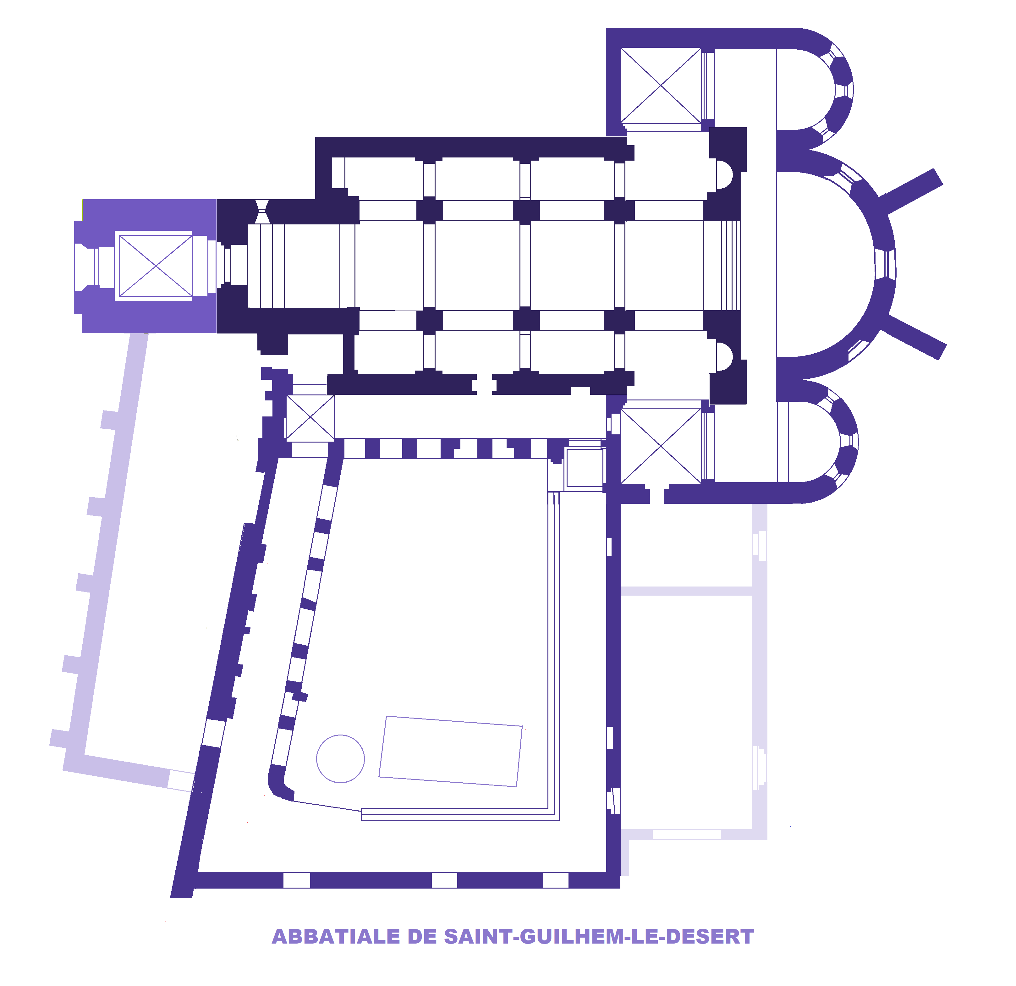 Abbatiale de Saint-Guilheim-le-Désert, Plan